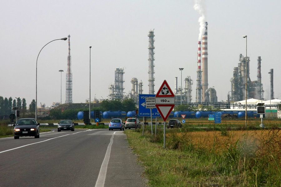 Immagine della raffineria Eni di Sannazzaro de Burgondi (PV), alle porte dell'abitato